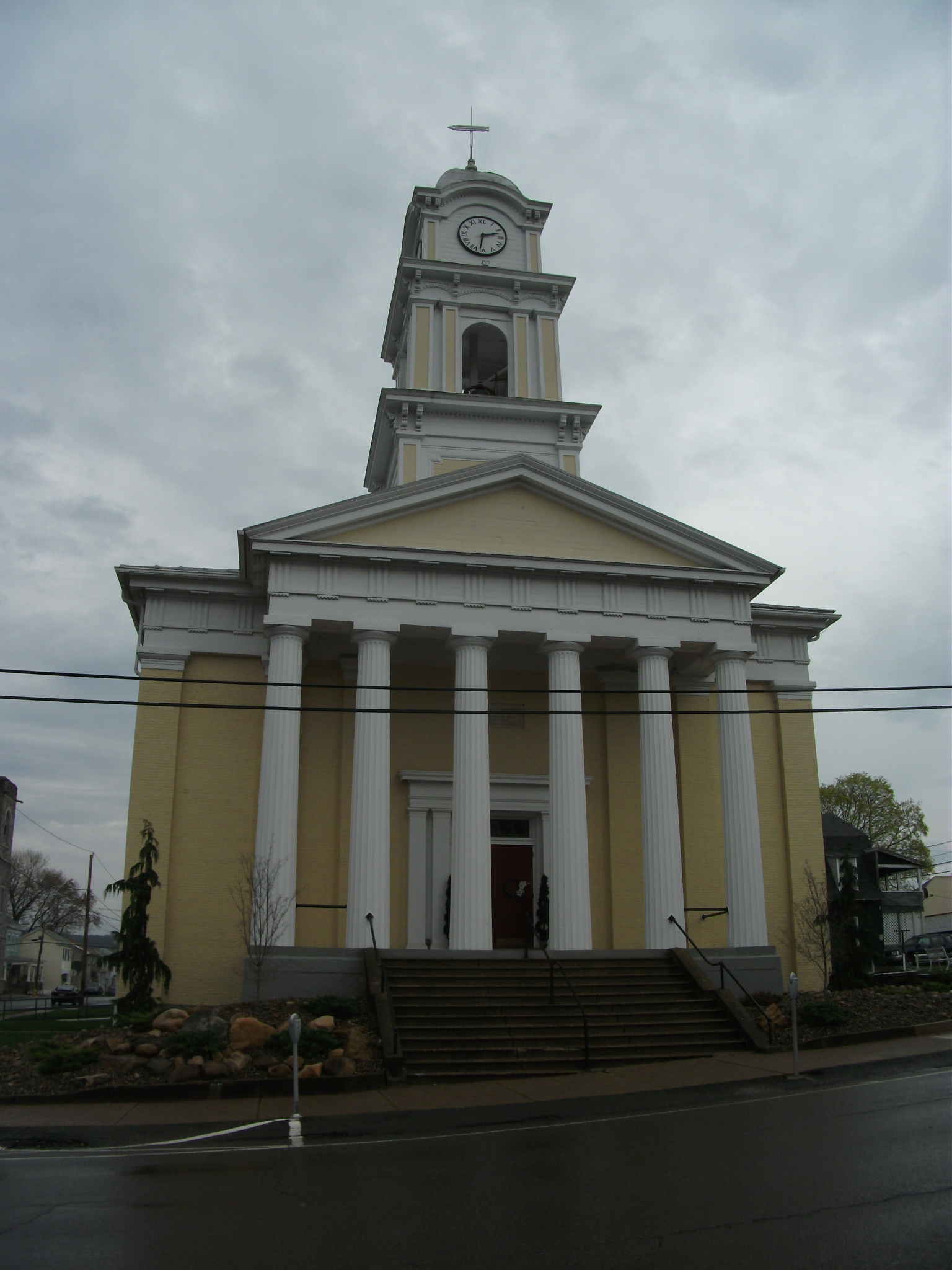 Danville, Pennsylvania